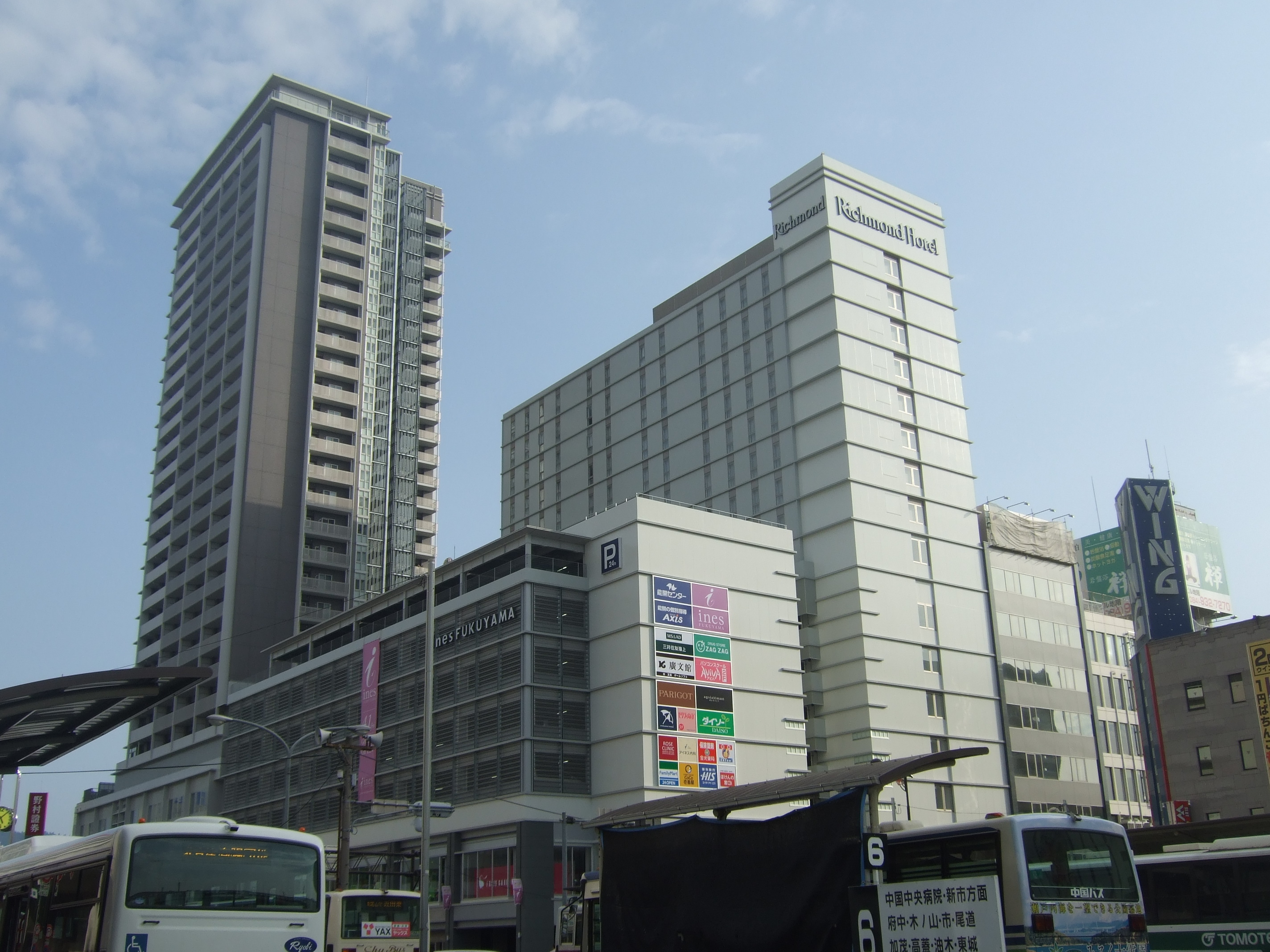 福山市のアイネス福山。リッジモンドホテルなどが入居する。